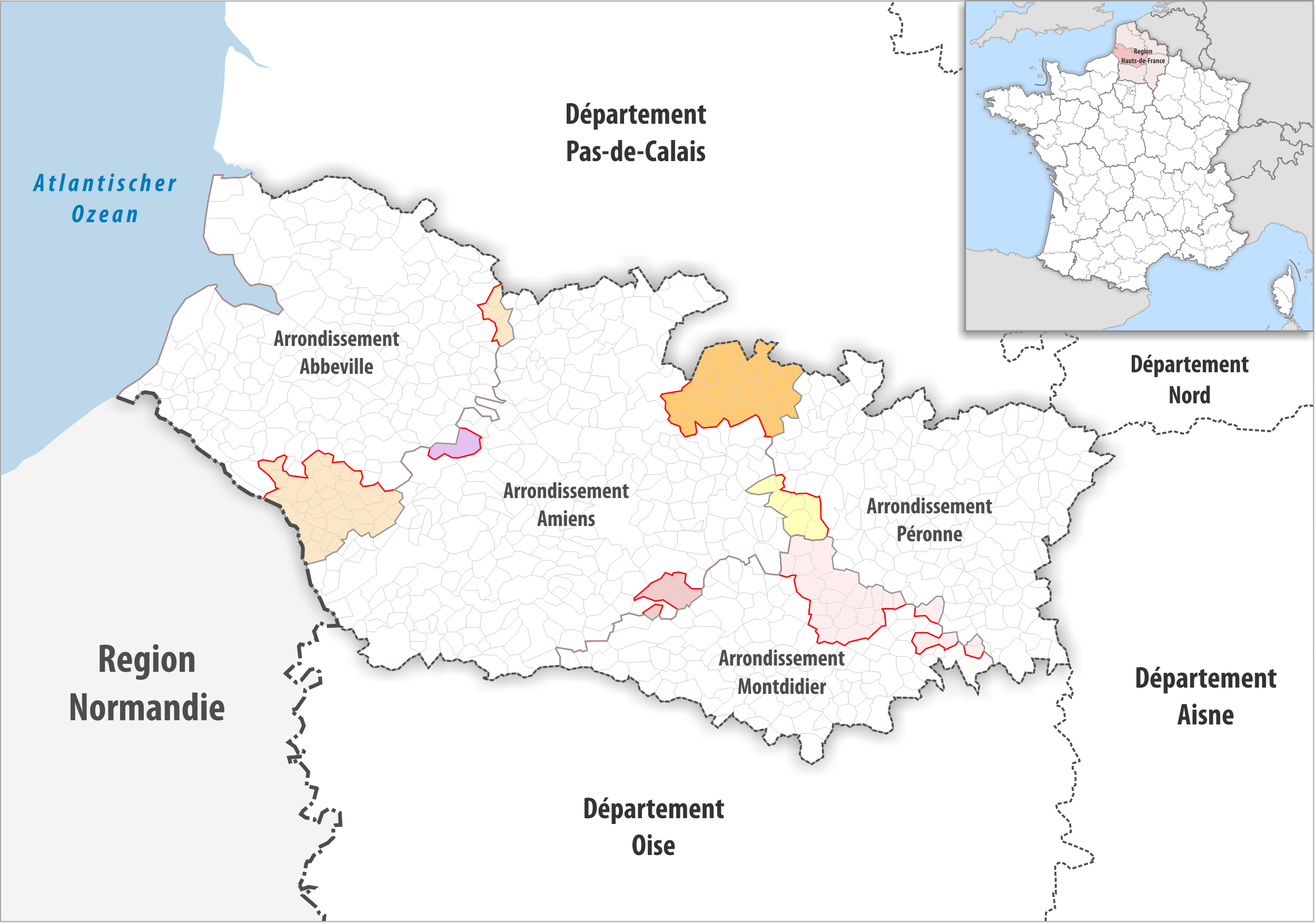 Arrondissements Anpassungen auf 2017 im Departement Somme